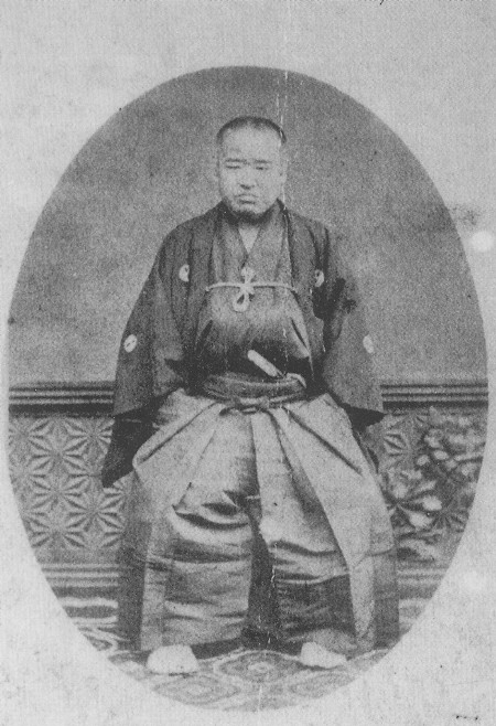 伊達慶邦 Date Yoshikuni.鶏卵紙